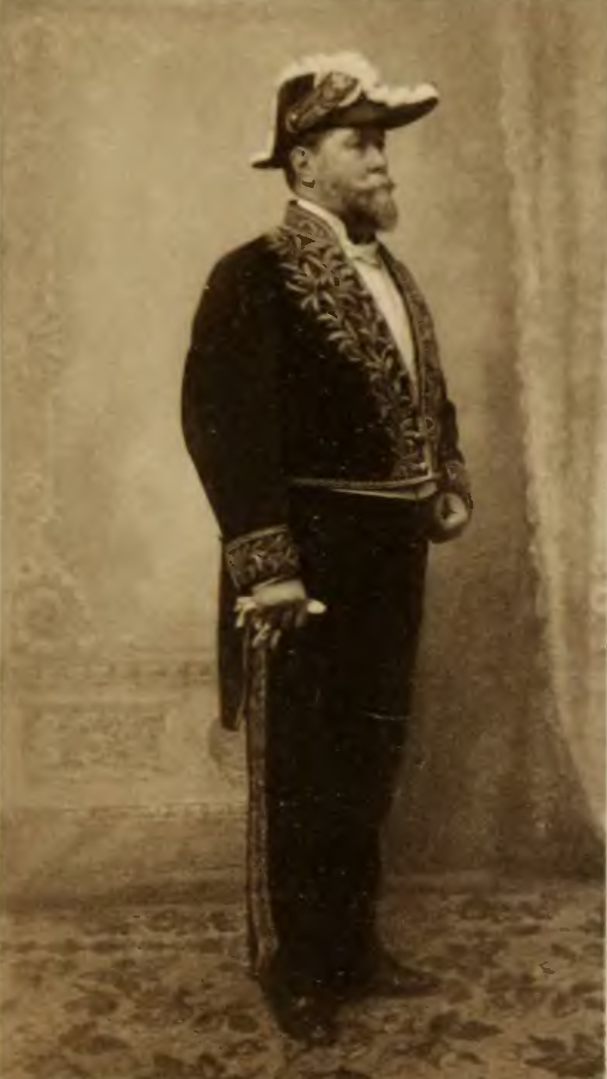 Biografía de Eduardo Wilde, por la casa editorial